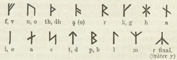 Runenalphabet (nordisch), aus Meyers Konversationslexikon 1888/89